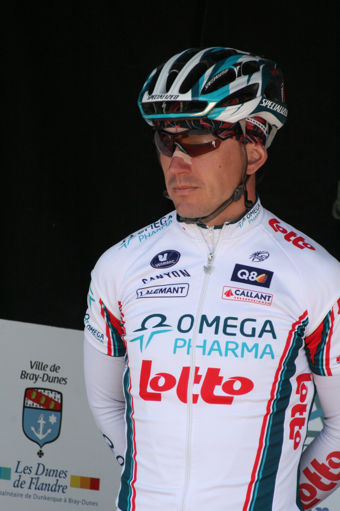 Wilfried Cretskens, lors de la présentation des équipes des 4 jours de Dunkerque 2010